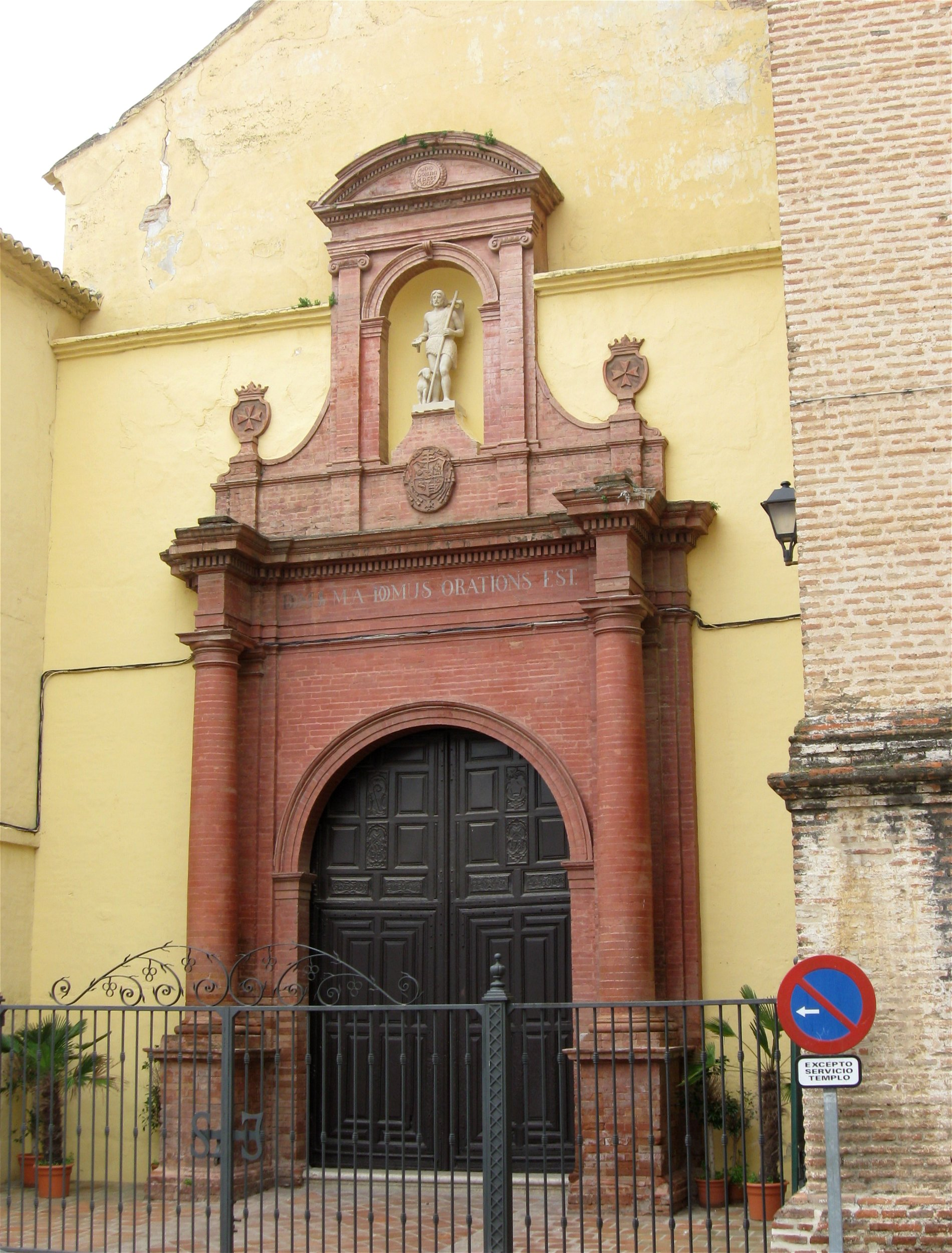 San Juan Bautista, Vélez-Málaga, Málaga